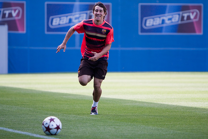 Primer entrenament abans de Roma